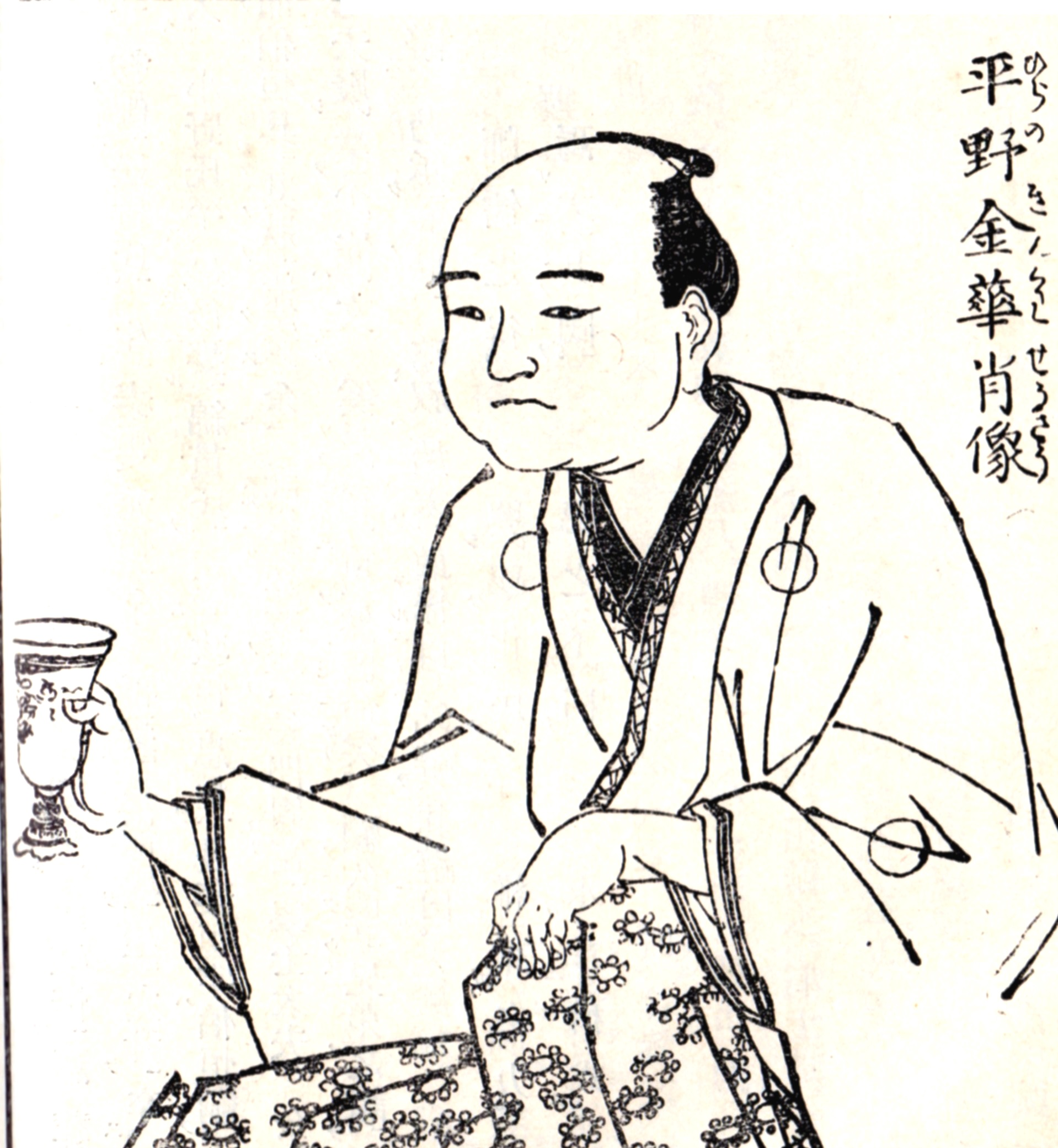 1914年に刊行した『先哲像伝』の挿絵として描かれた。